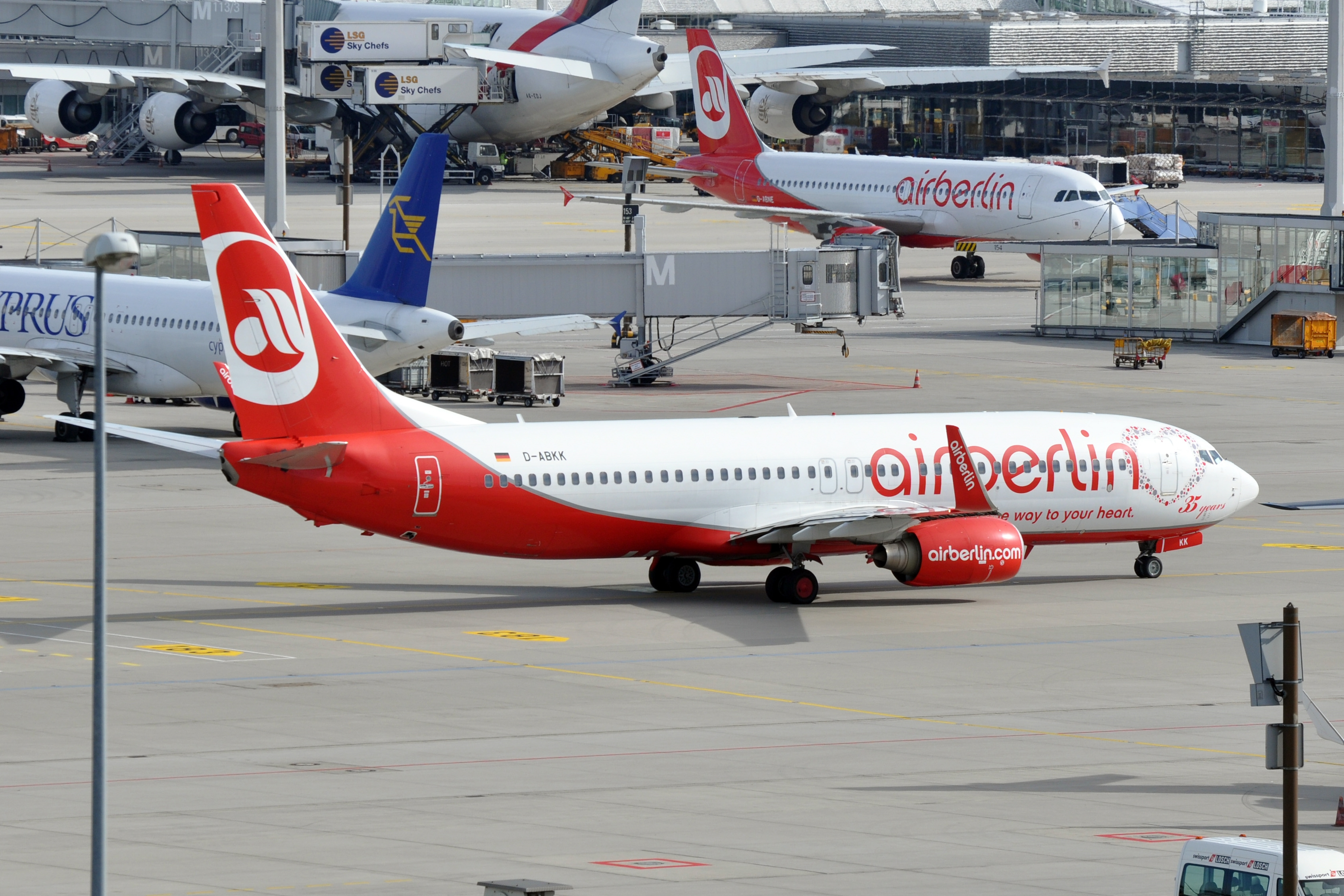 MSN 37753 LN 3261 B737-86J AIR BERLIN MUC